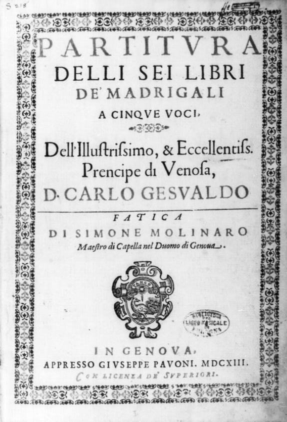 Carlo Gesualdo - Madrigaux edition 1613